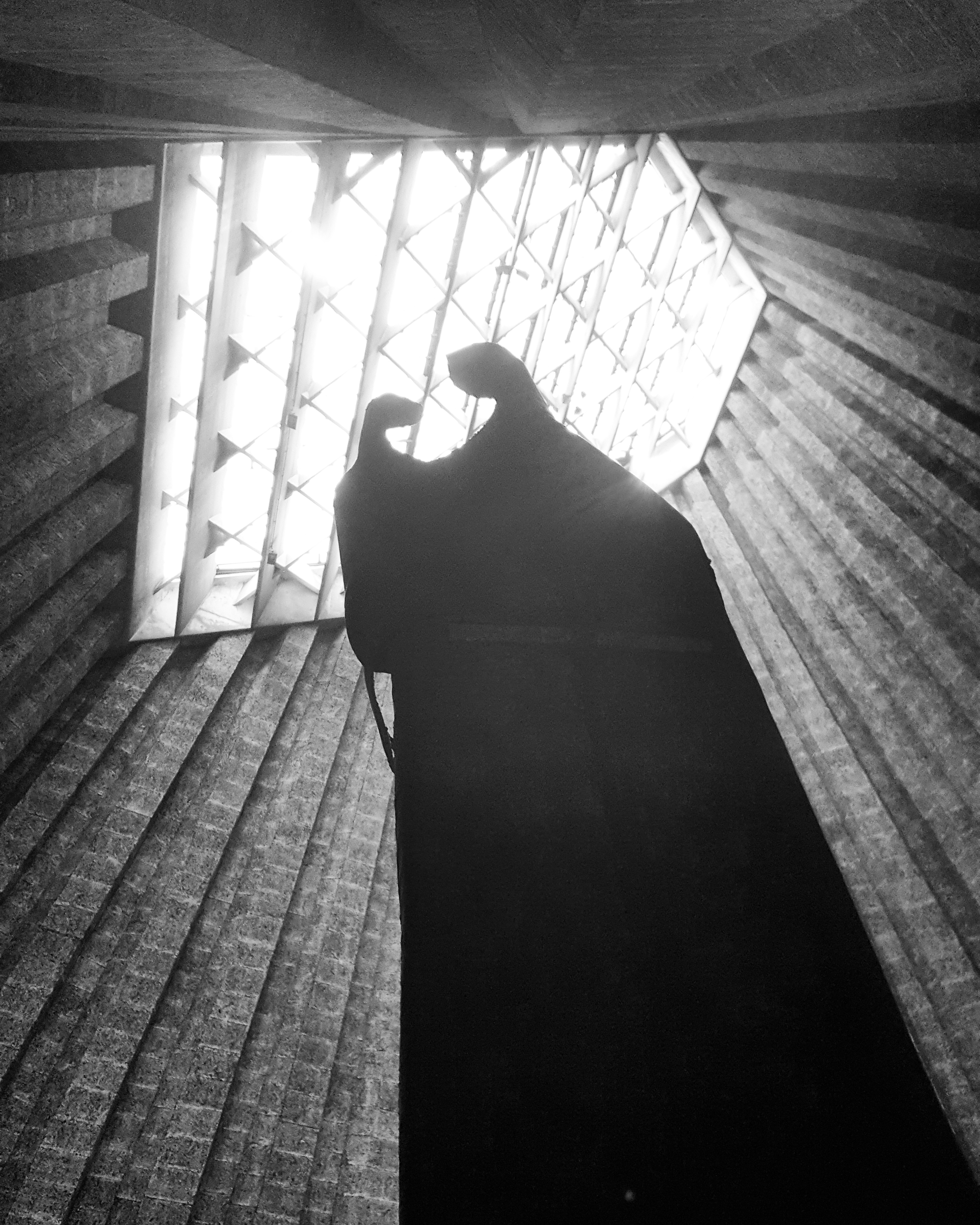 Een woontent van God te midden van zijn volk: progressief, modernistisch, sober kerkgebouw, ontwerp van agnostisch architect Leon Stijnen, 1961-1968